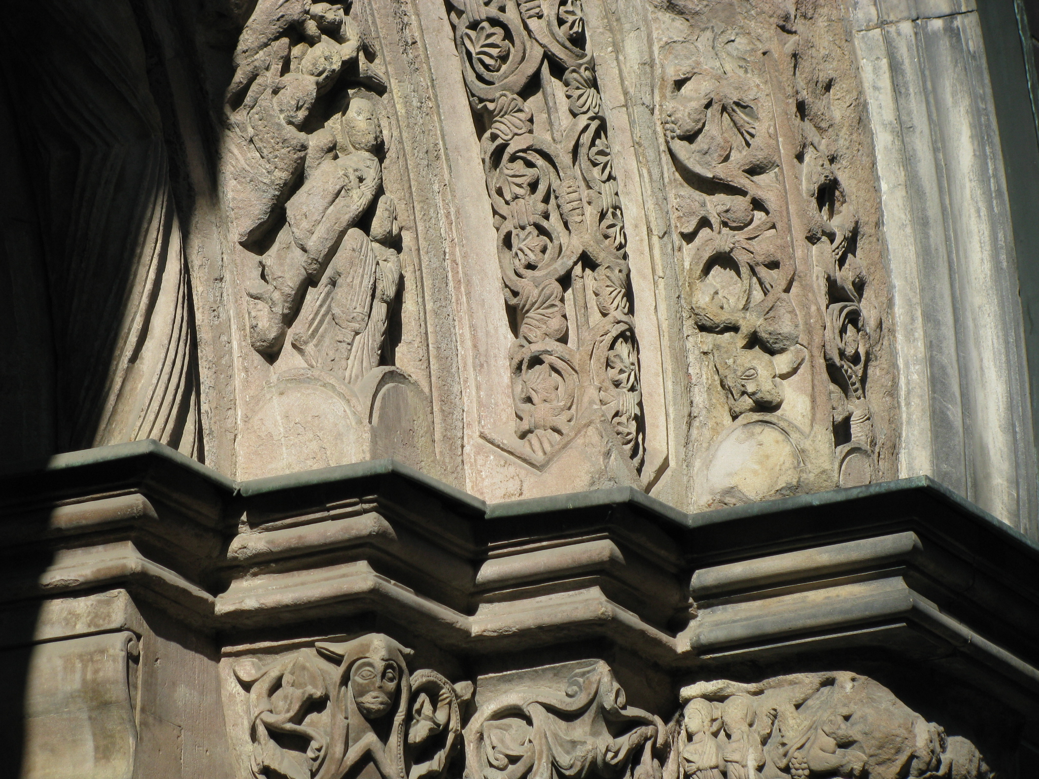 Wrocław, kościół św. Marii Magdaleny – portal z opactwa na Ołbinie, fragment